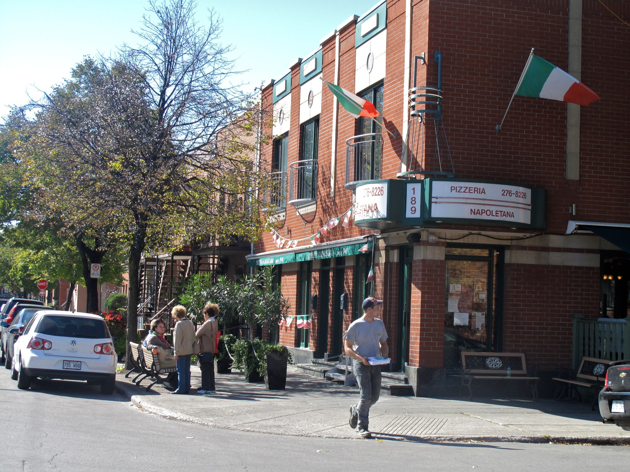 randonnée urbaine 5.10,10 Petite Italie - Marché Jean Talon